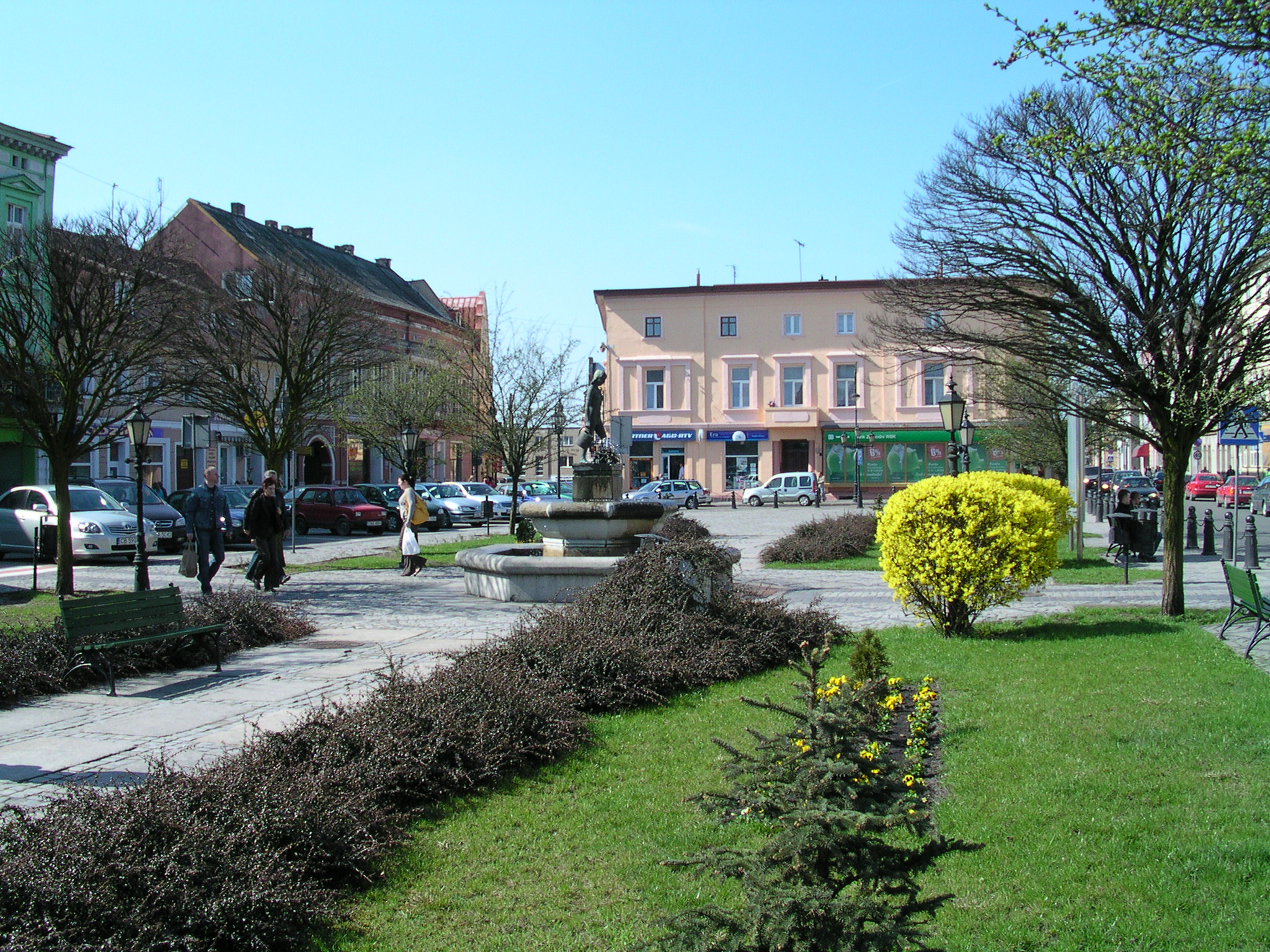 Rynek